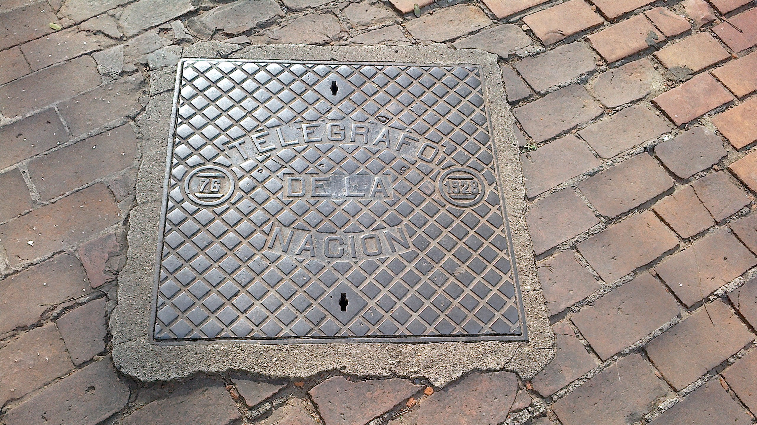 Tapa de telégrafo aun existente en Avenida Virrey Vertiz y Sucre, barrio de Belgrano, Buenos Aires, Argentina.